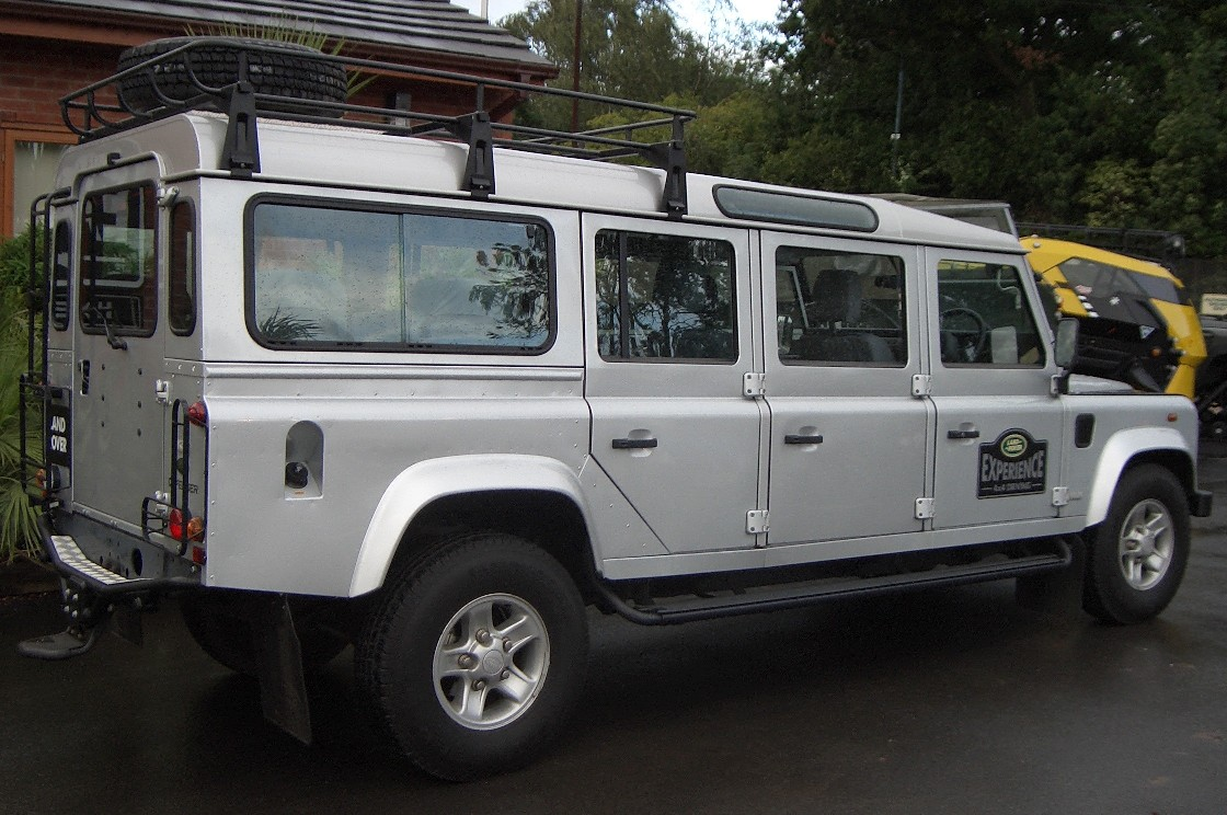 Land Rover Defender Stretch Limo, Land Rover Museum Gaydon/UK